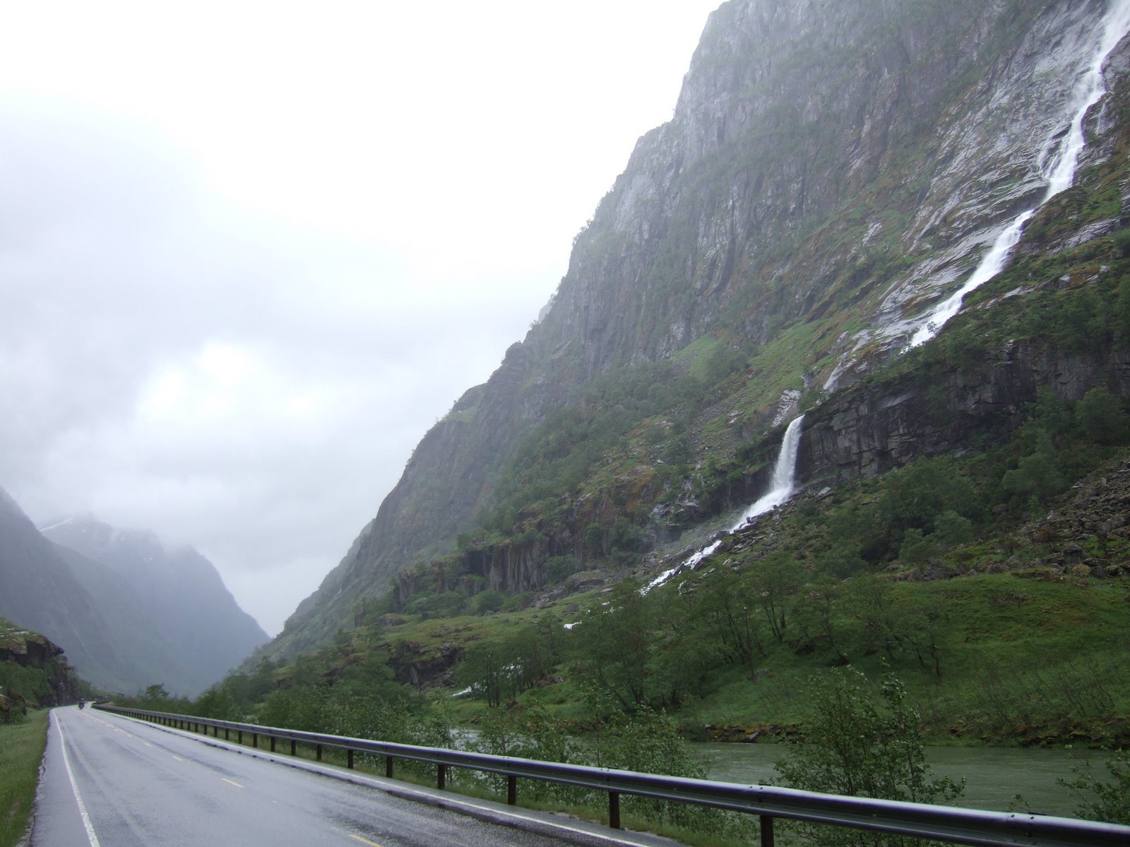 Jølster, Norway